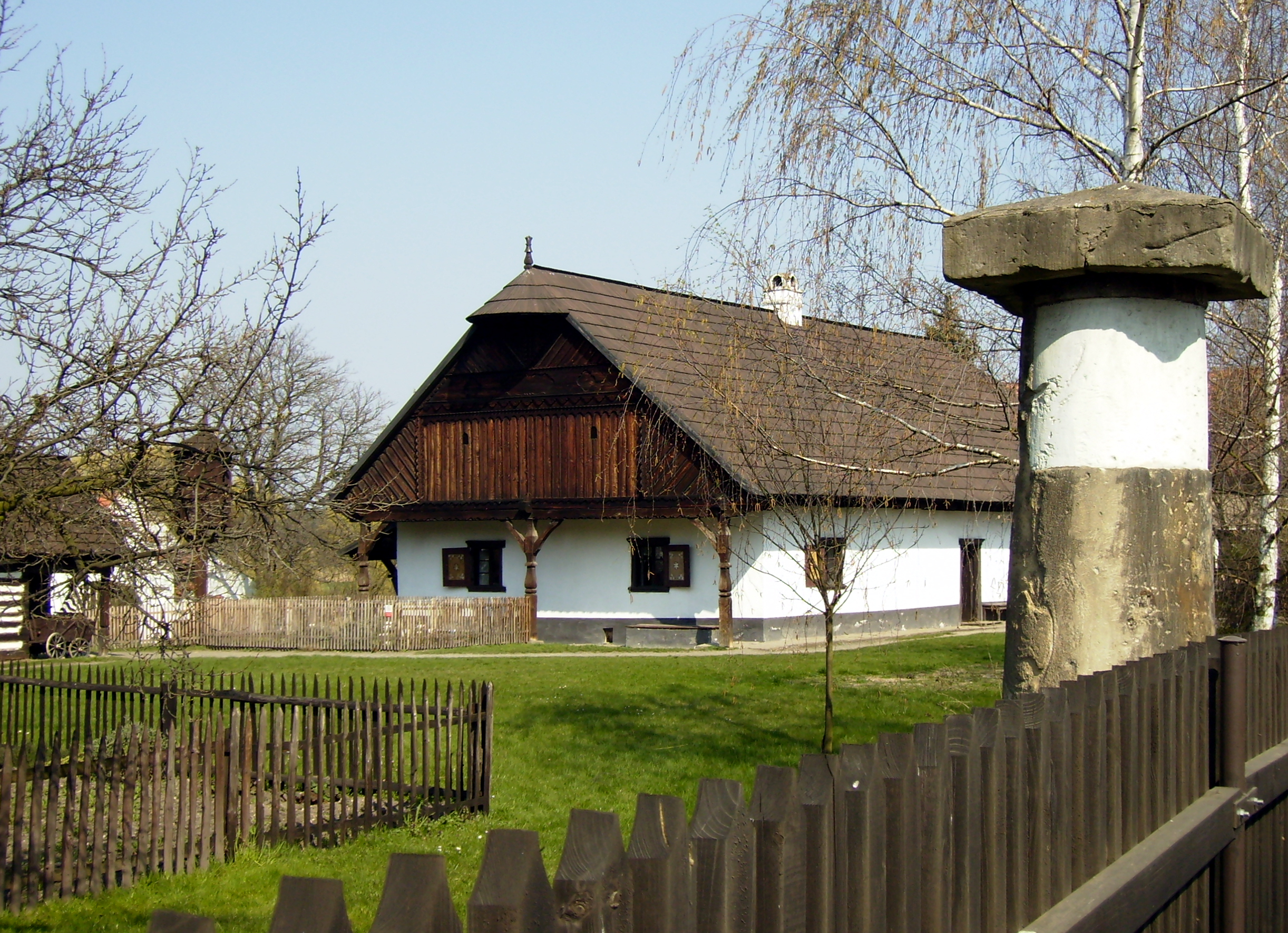 Staročeská chalupa (Old Bohemian House) in open air museum in Přerov nad Labem, Czech Republic